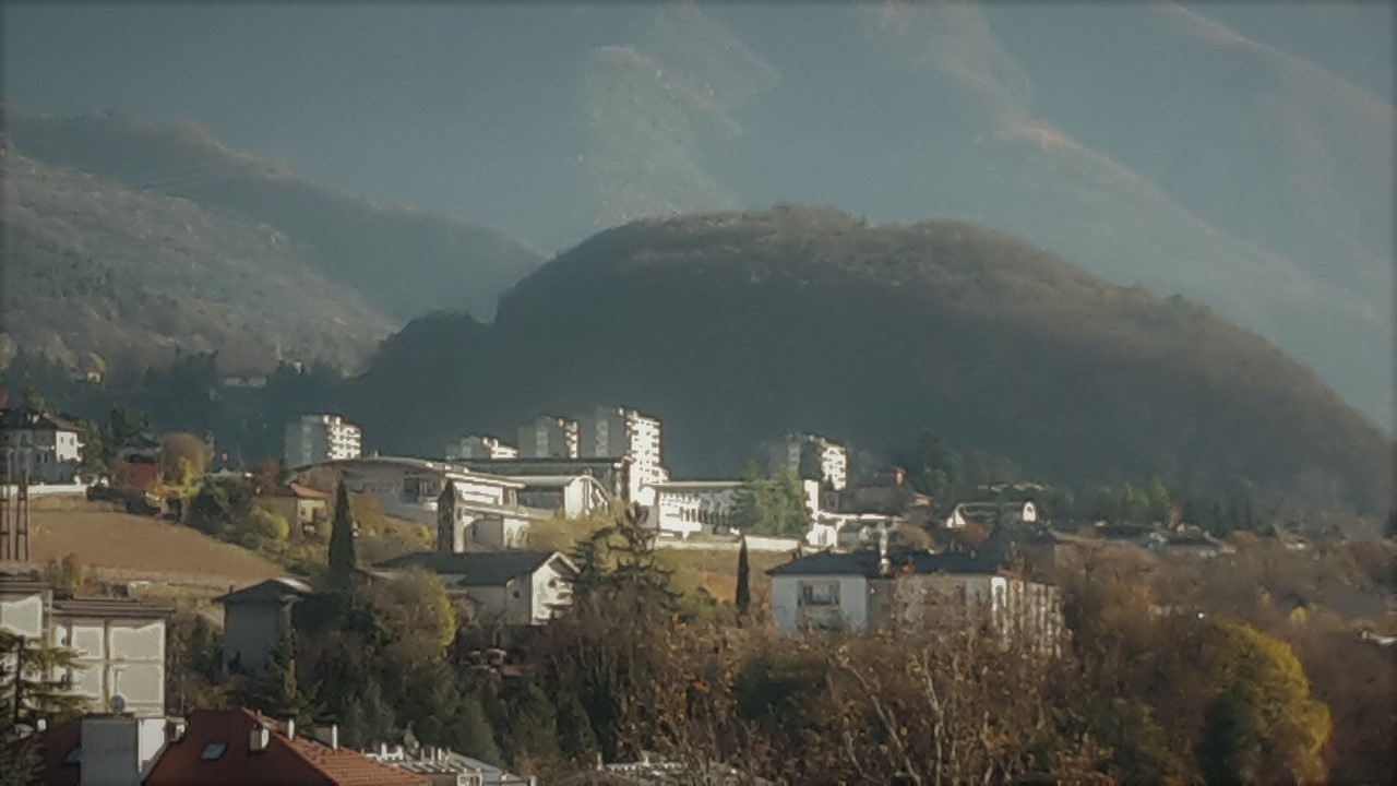 Madonna Bianca - Le torri e il Doss San Rocco